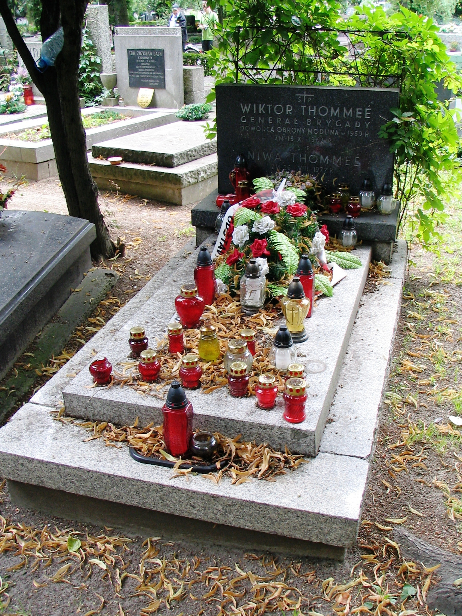 Grób gen. bryg. Wiktora Thommée